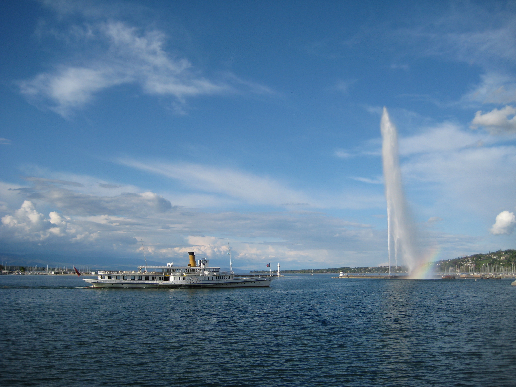 Lake Geneva (Lac Léman) with Jet d'Eau, Geneva (Switzerland)